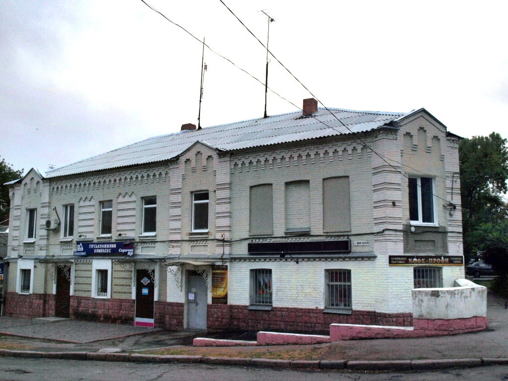 Полтава ріг вулиц Шолом Алейхем і Паризької Комуни